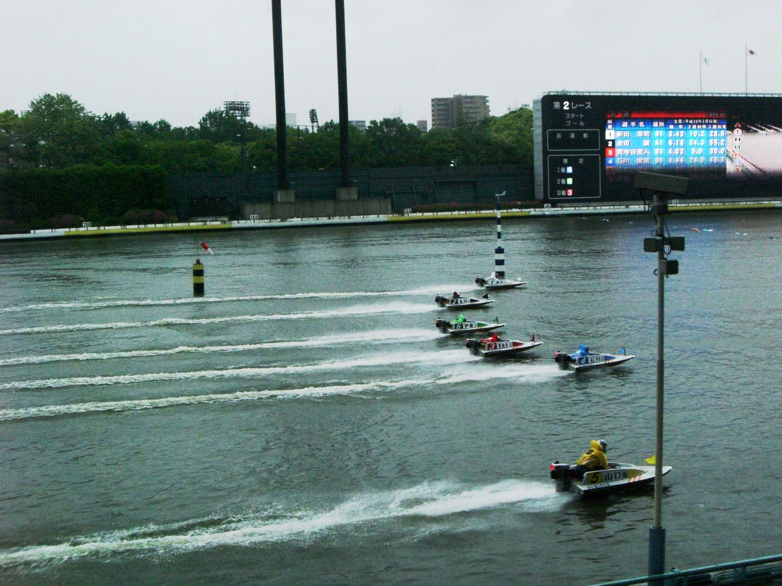 KYOTEI at Suminoe OSAKA